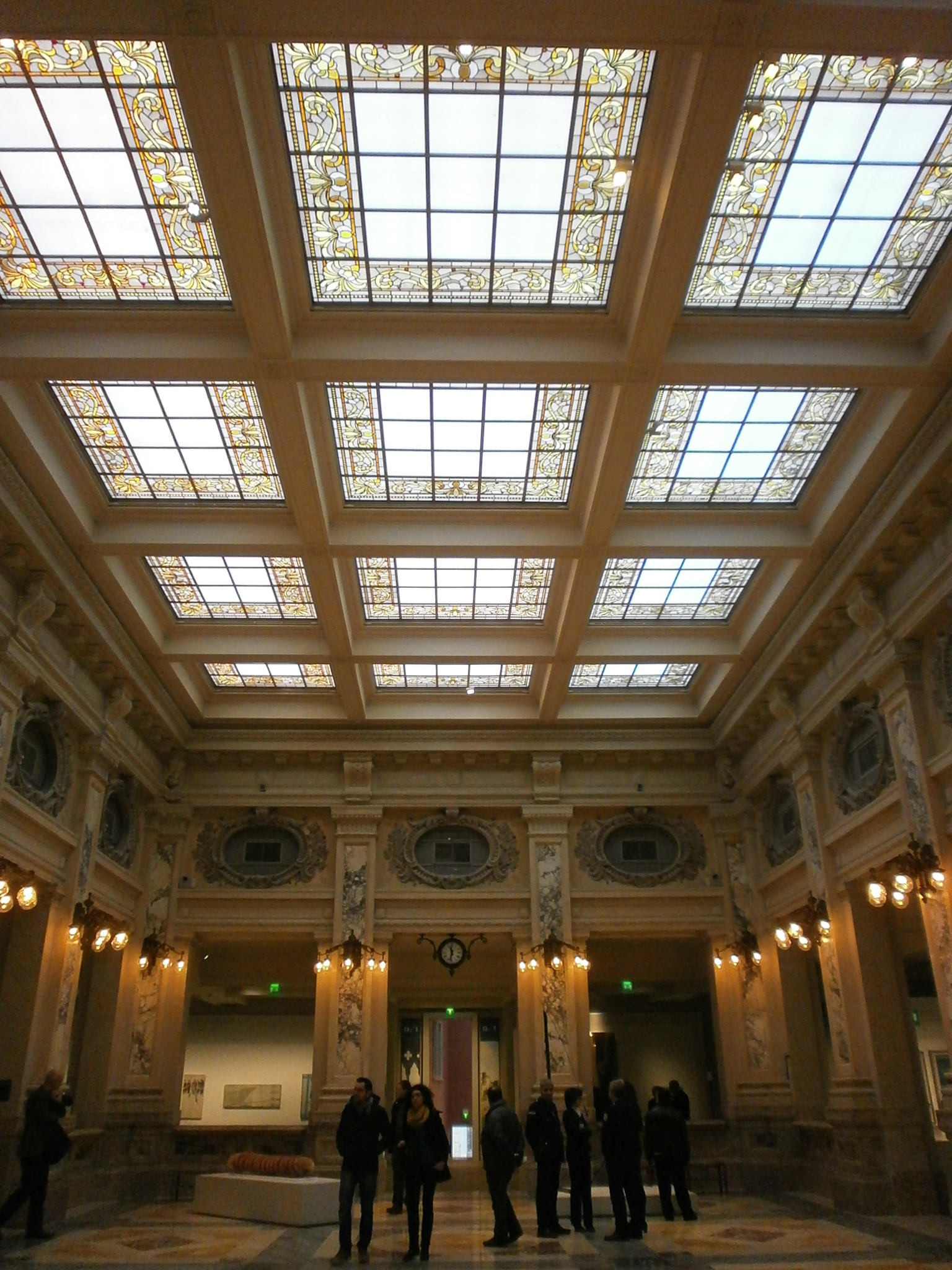 Gallerie di piazza Scala - Palazzo della Banca Commerciale Italiana - salone interno